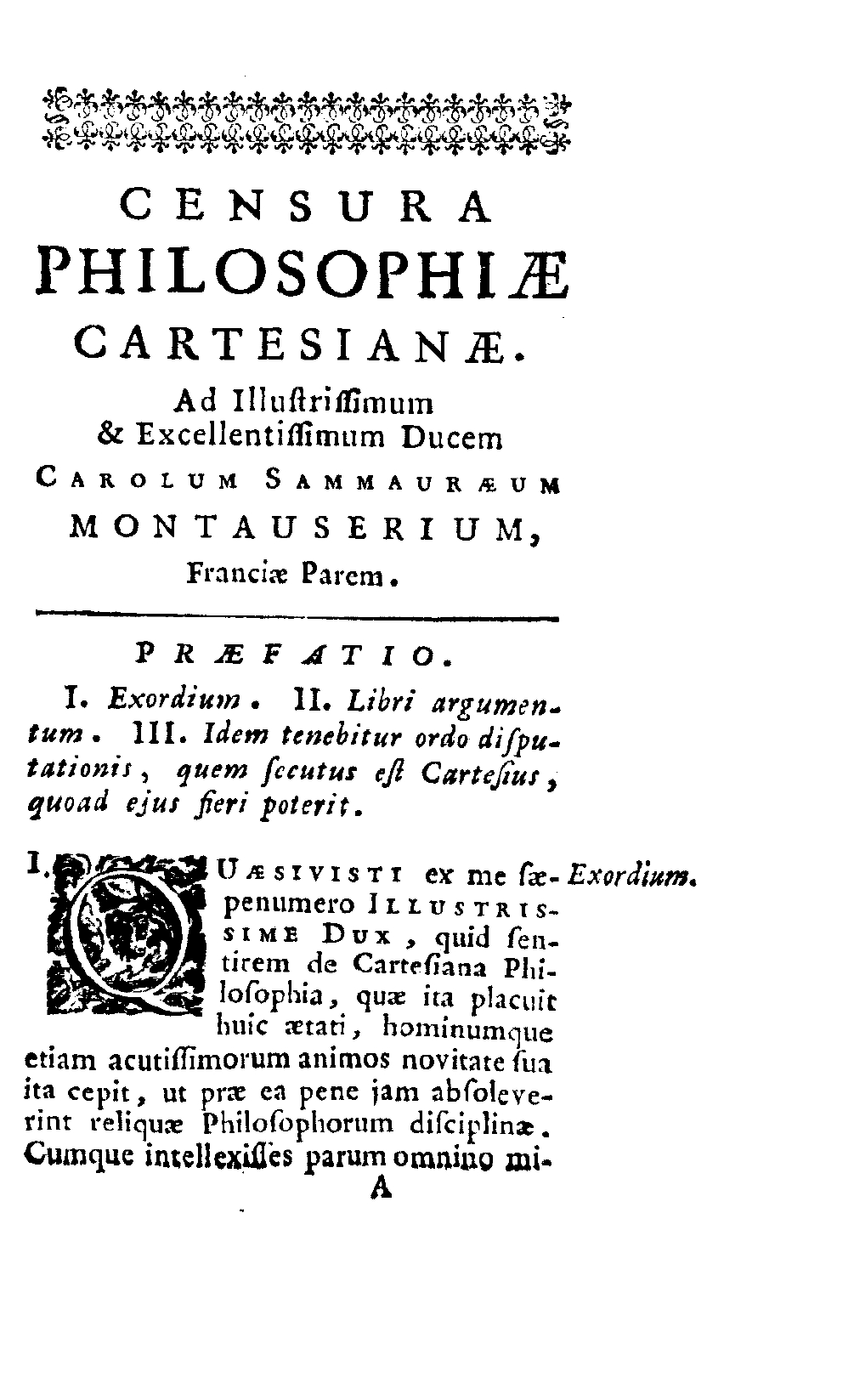 Petri Danielis Huetii, episcopi Abrincensis, Censura philosophiae Cartesianae. - Bononiae : typis Laelii a Vulpe, 1723. - [36], vi, 7-228 p. ; 12º .